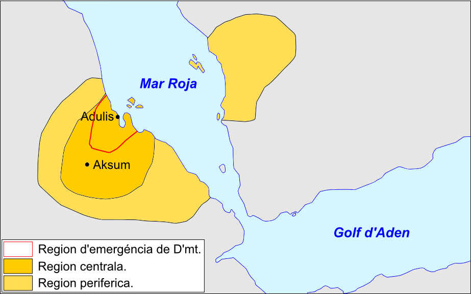 Extension dau Reiaume d'Aksum.